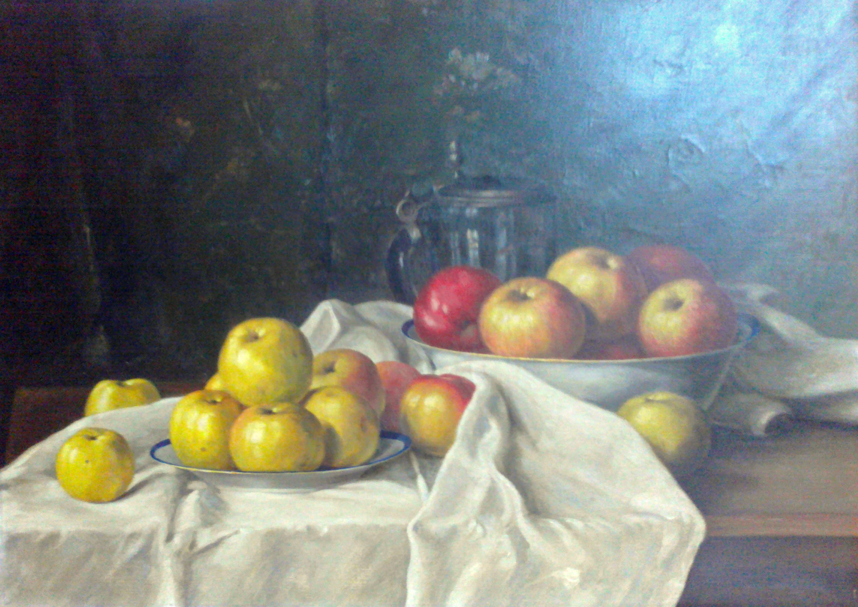 zátiší s jablky